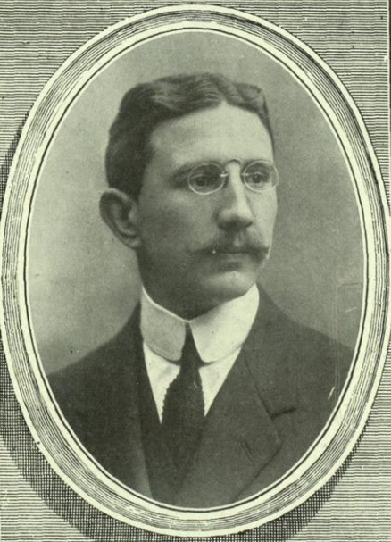 Conde de Gamazo.